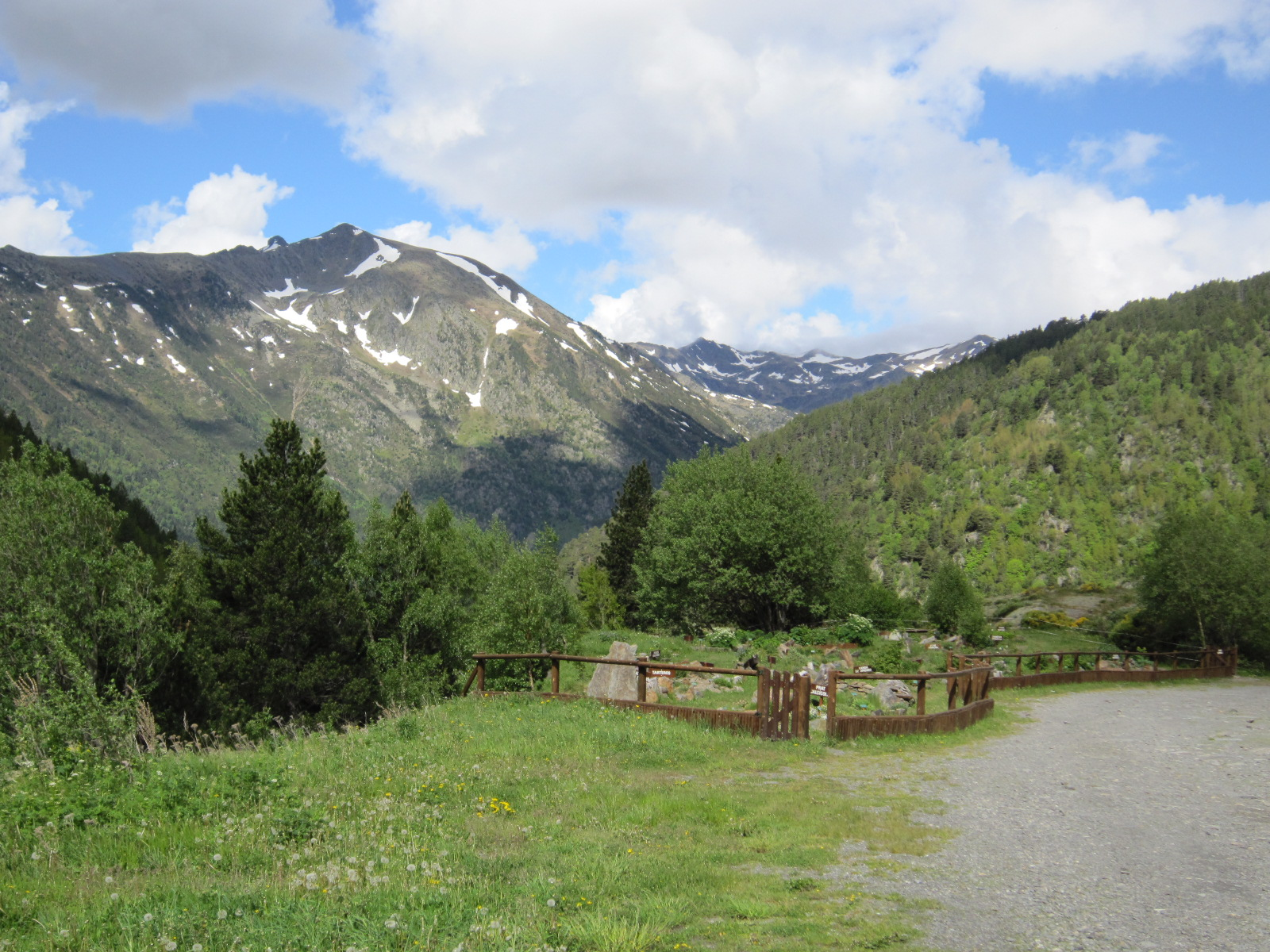 Jardi botànic del Parc Natural de la vall de Sorteny